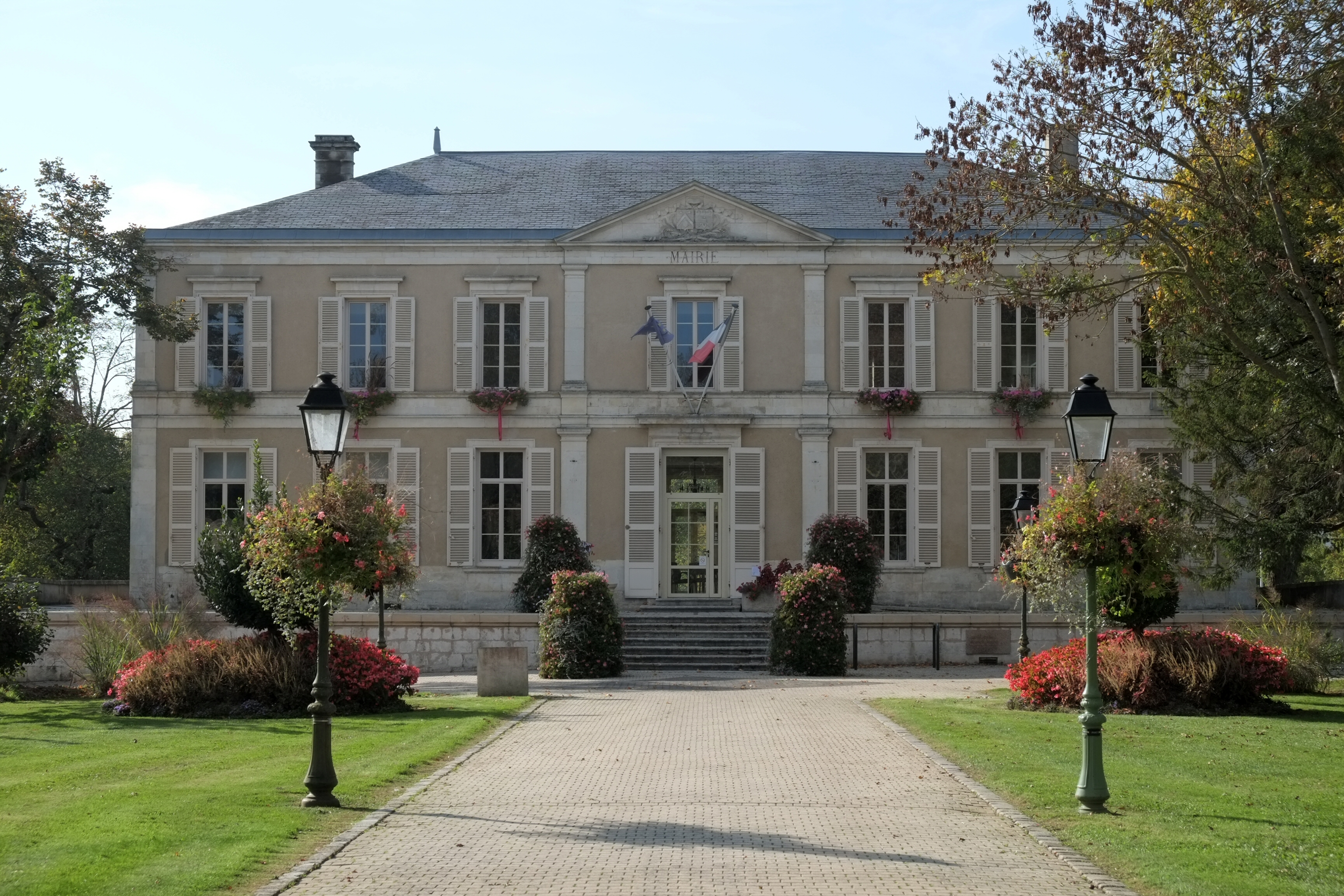 Mairie Nieul-sur-Mer Charente-Maritime France